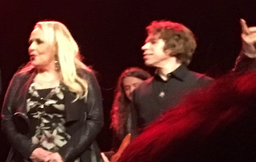 Maarit ja Sami Hurmerinta, Kulttuuritalo 24.11.2016 Love Records